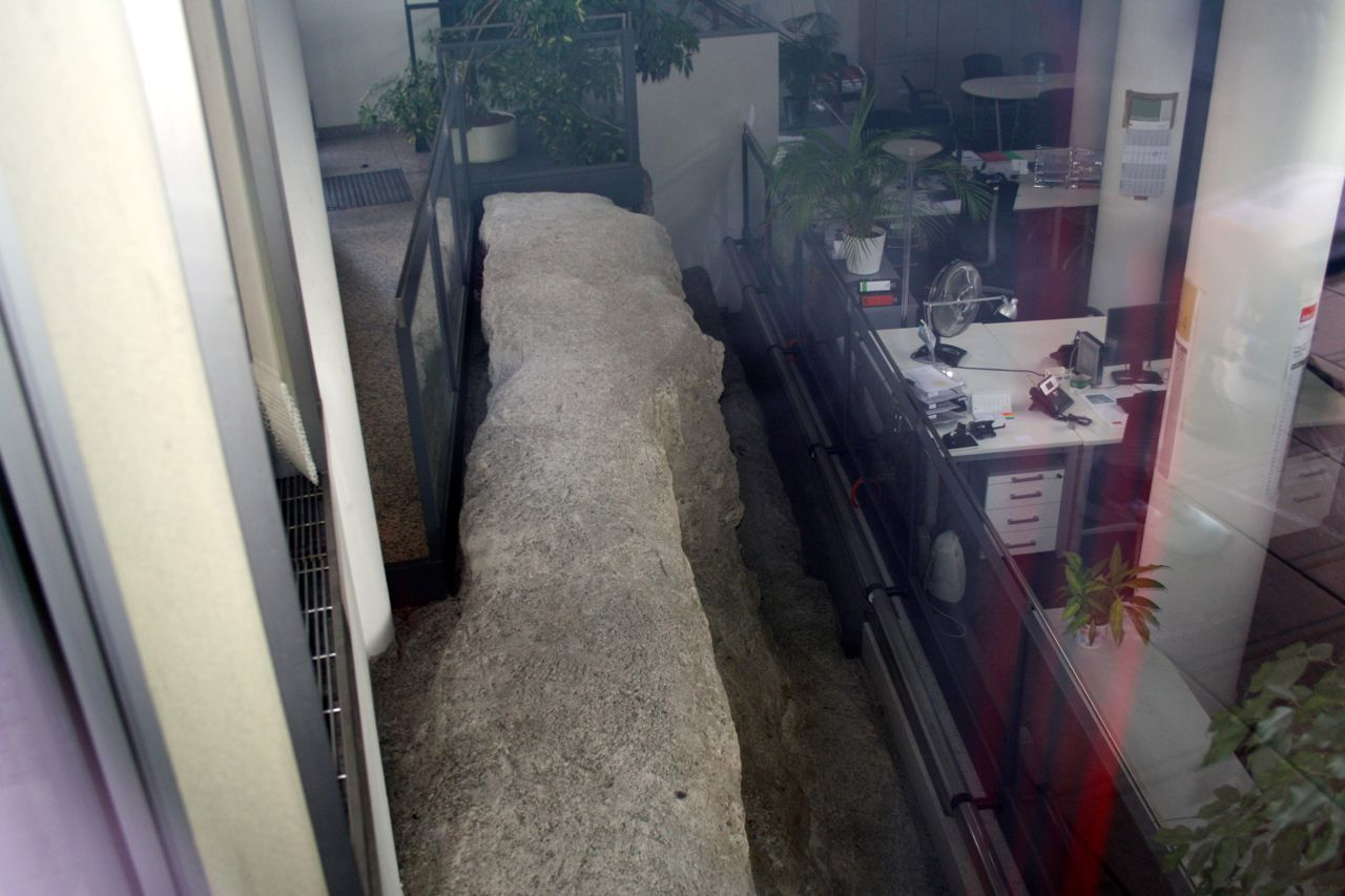 Wikipedia-Exkursion des Stammtisches München auf den Spuren der Münchner Stadtbefestigung